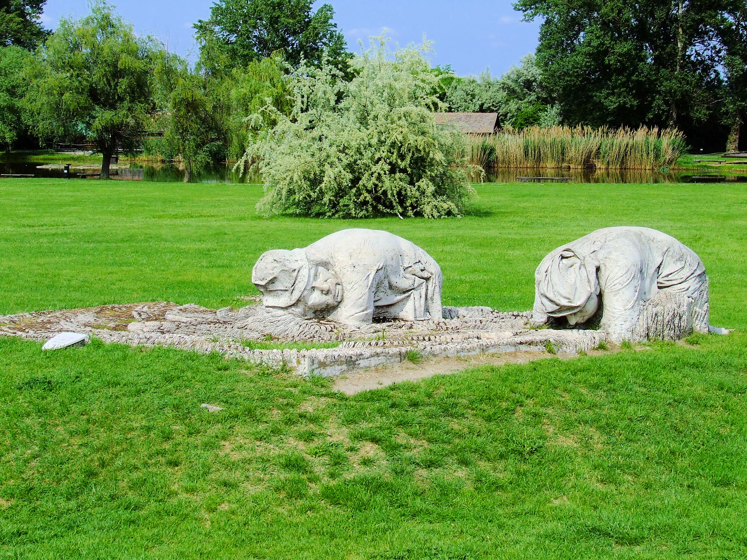 Földműves emlékmű. Ópusztaszeri Nemzeti Történeti emlékpark. Melocco Miklós alkotása (1986)